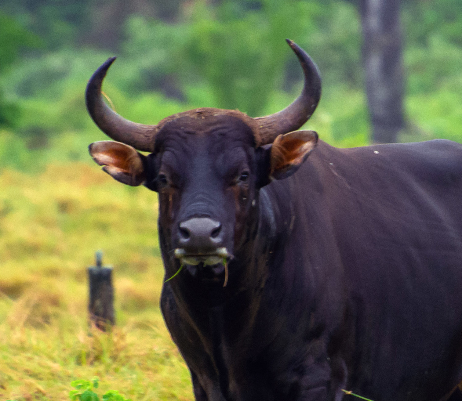 Banteng (Bos Javanicus) salah satu binatang yang dilindungi di Taman Nasional Alas Purwo, Sadengan, Kab. Banyuwangi , Jawa Timur